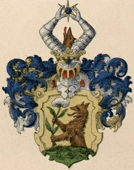 Wolffenschildi suguvõsa aadlivapp